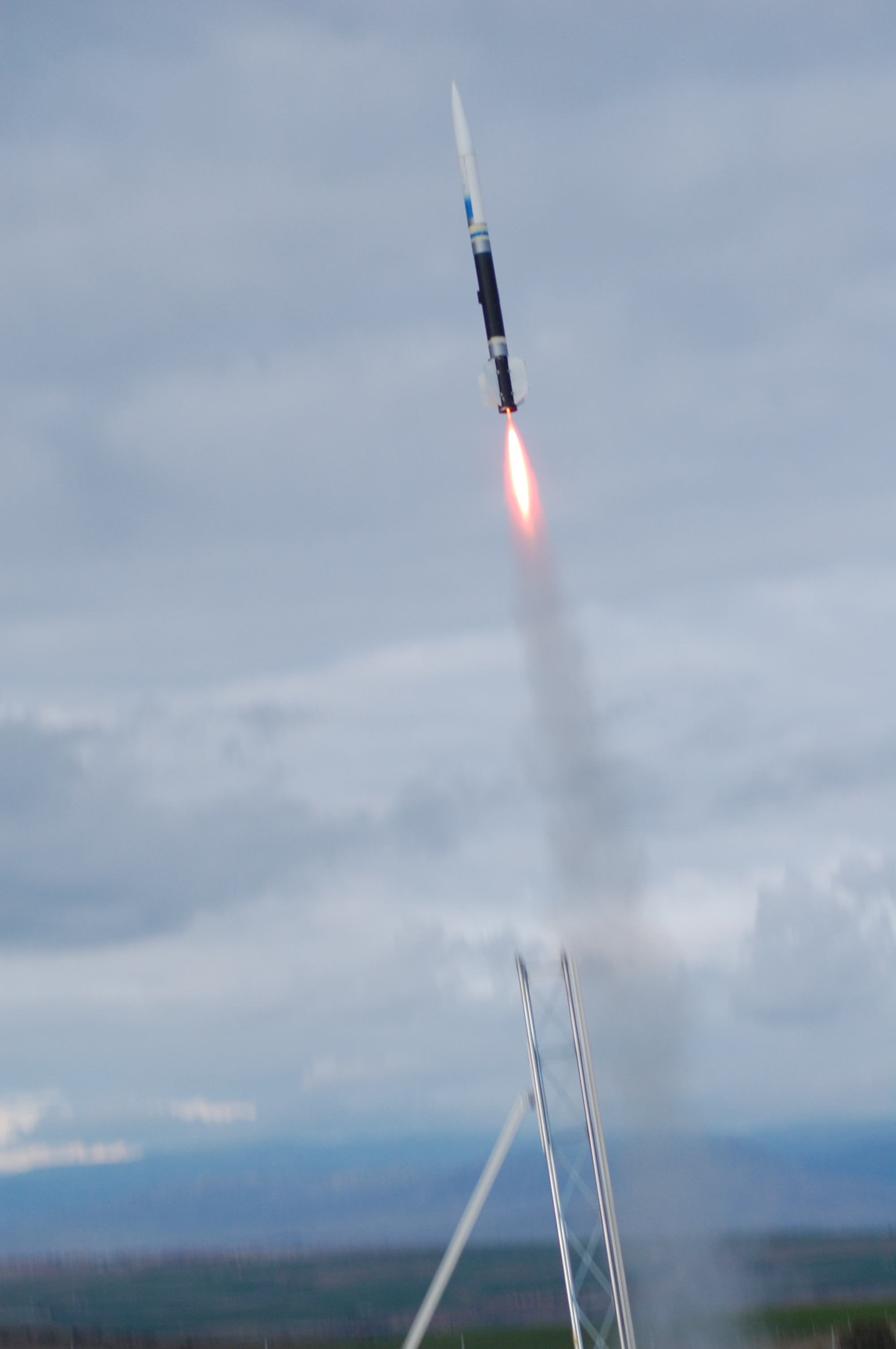 Cohete serie RK